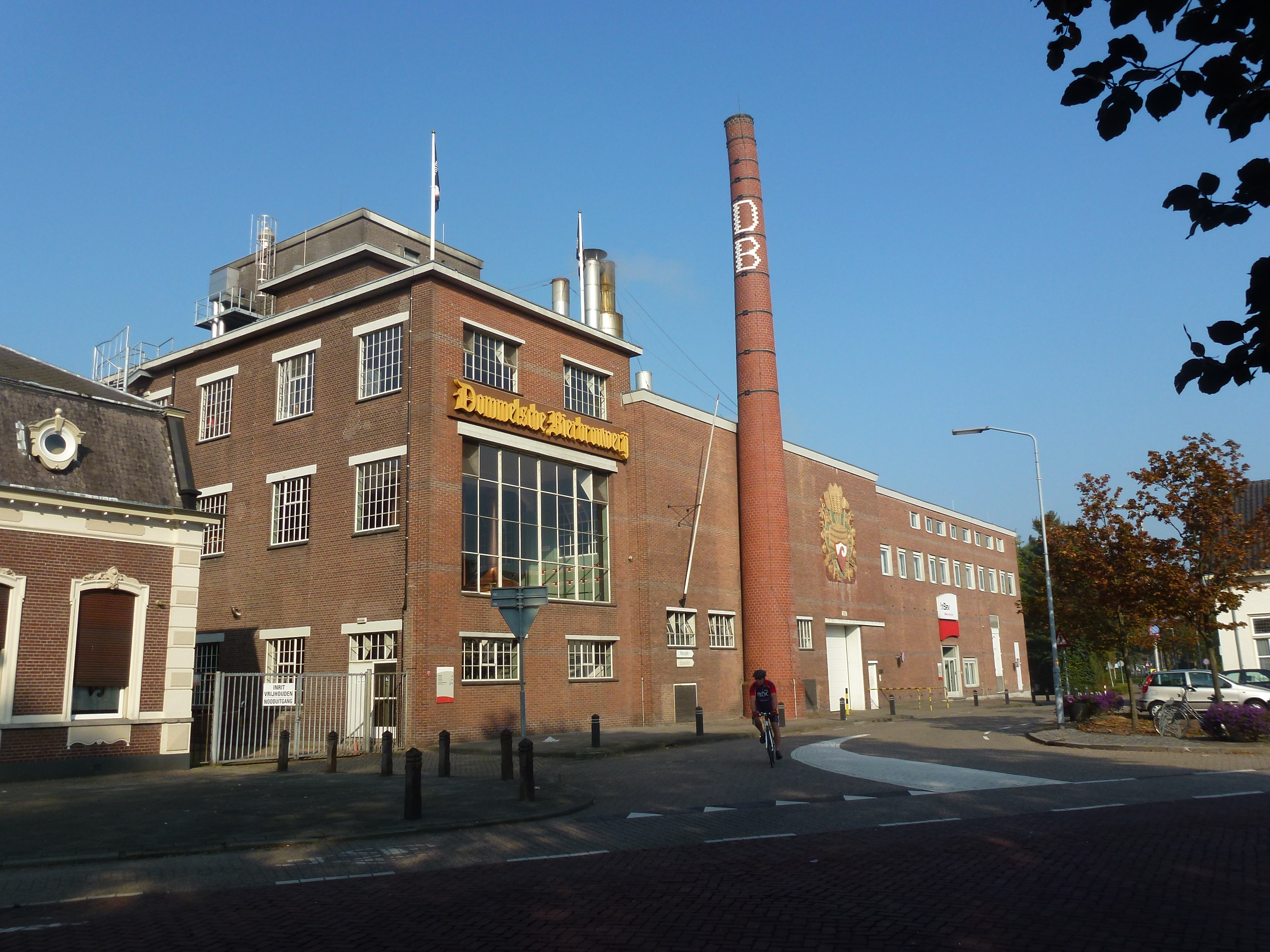 Dommelsche Bierbrouwerij